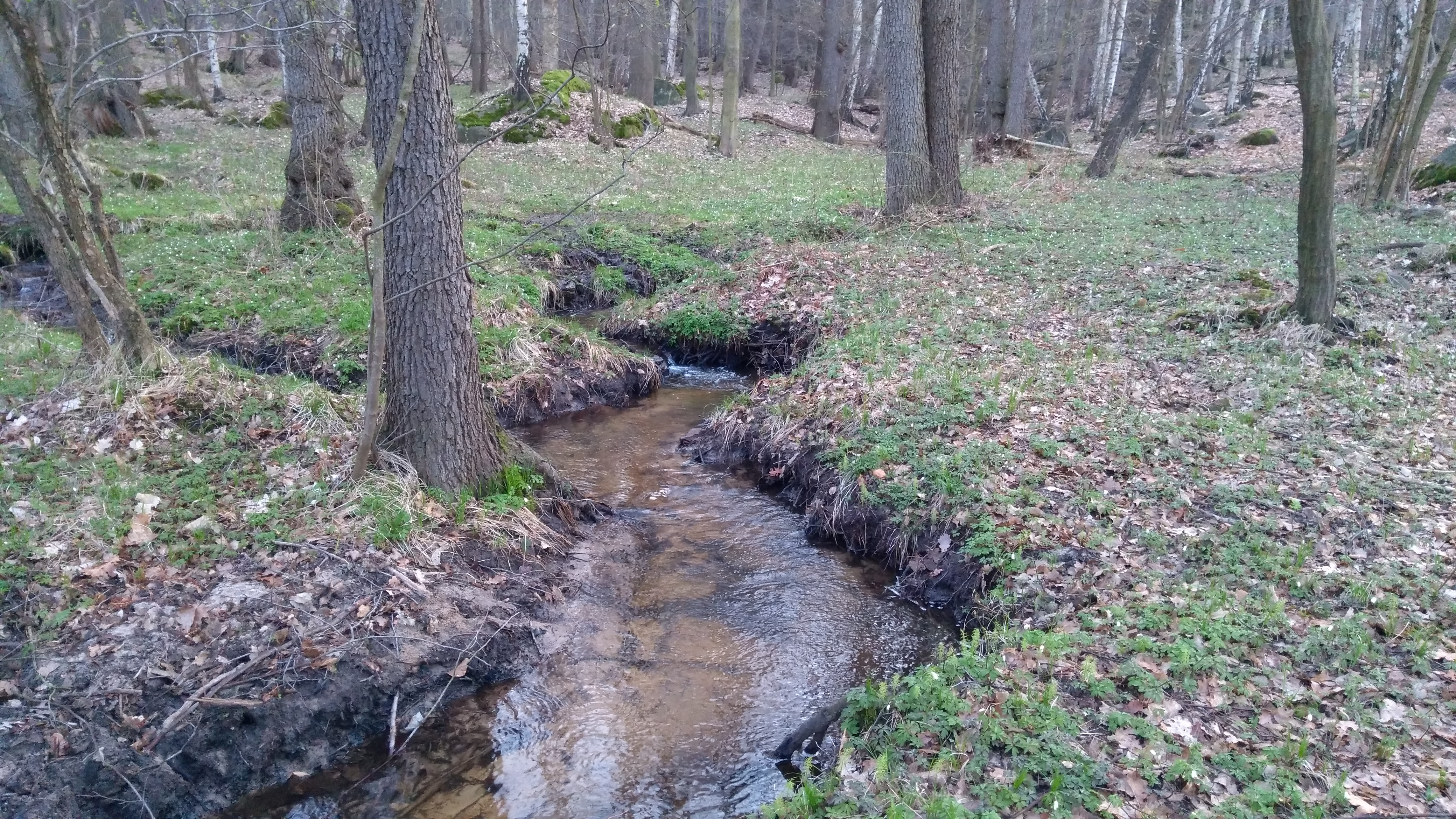 Potok.